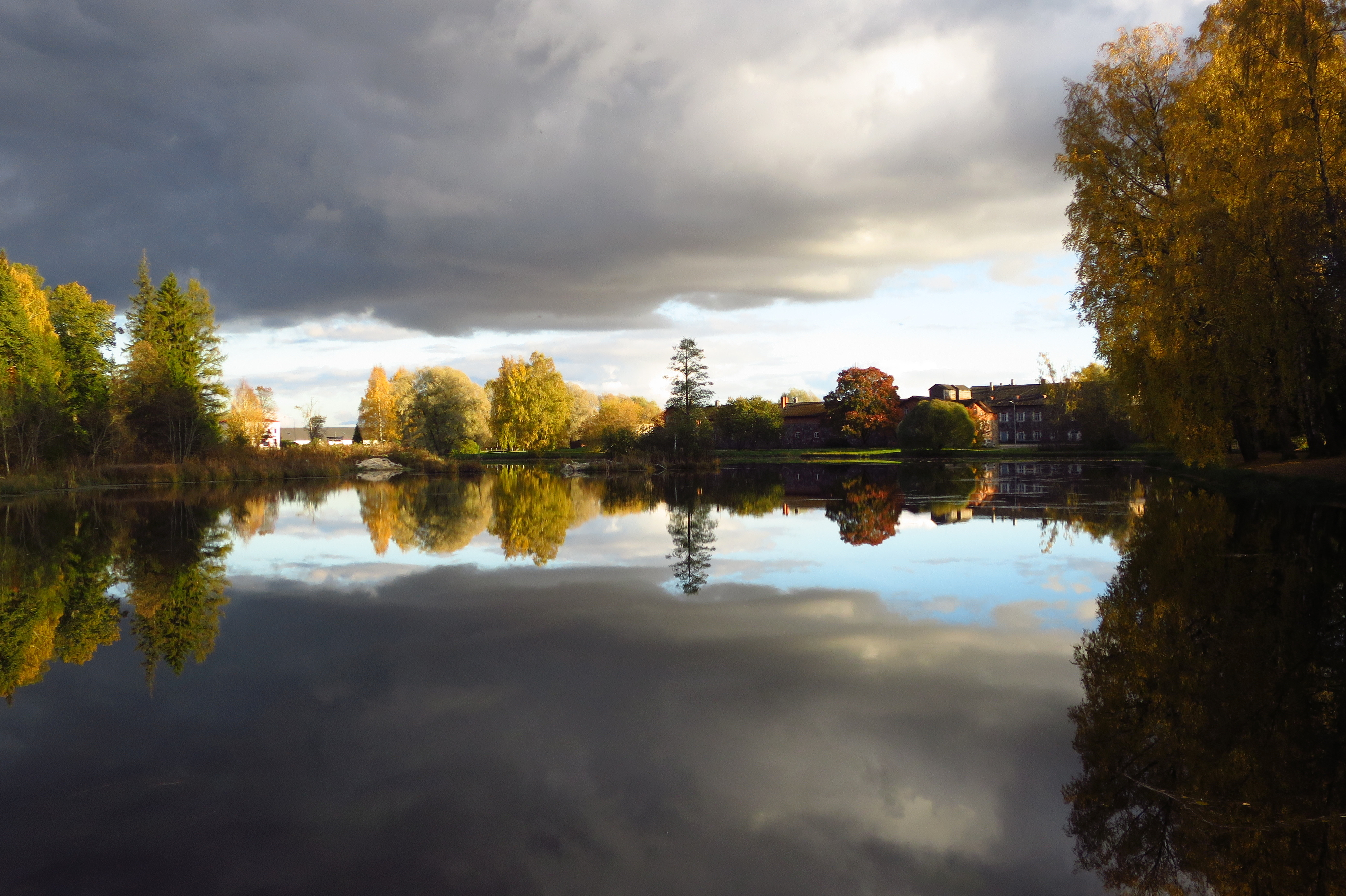 Jäneda Allikajärv